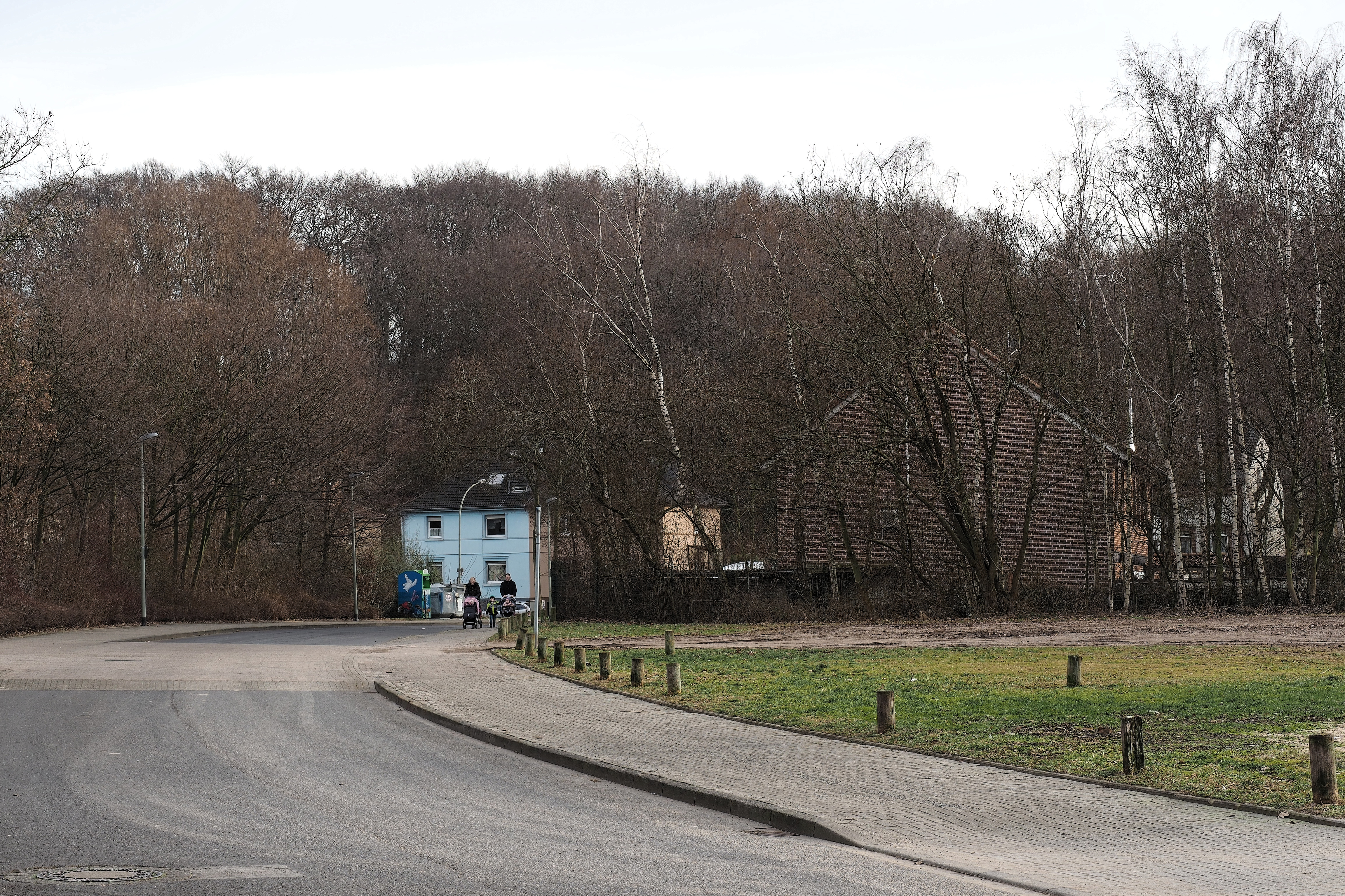 Das Sodinger Holz, der Restbestand eines Waldes auf dem Beimberg in Herne Sodingen